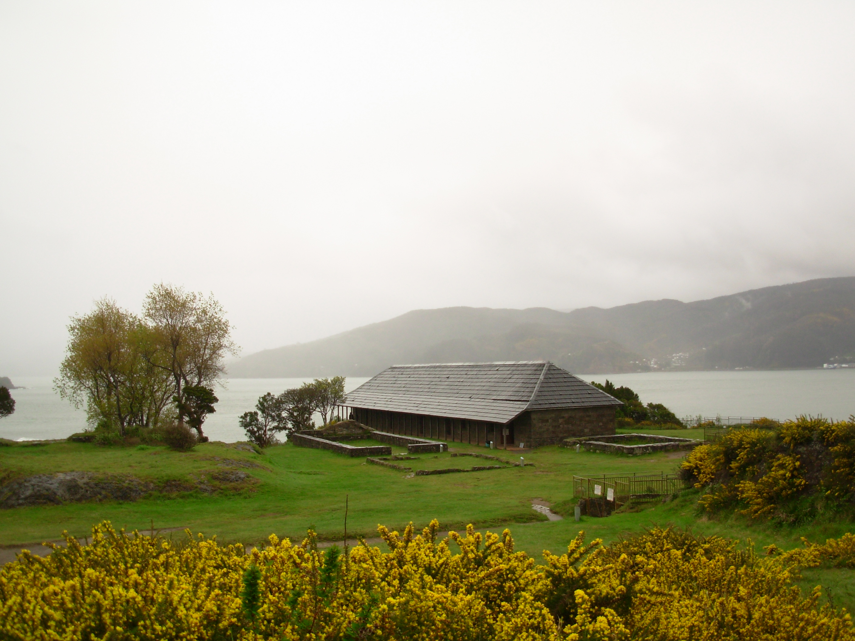 Castillo de Niebla